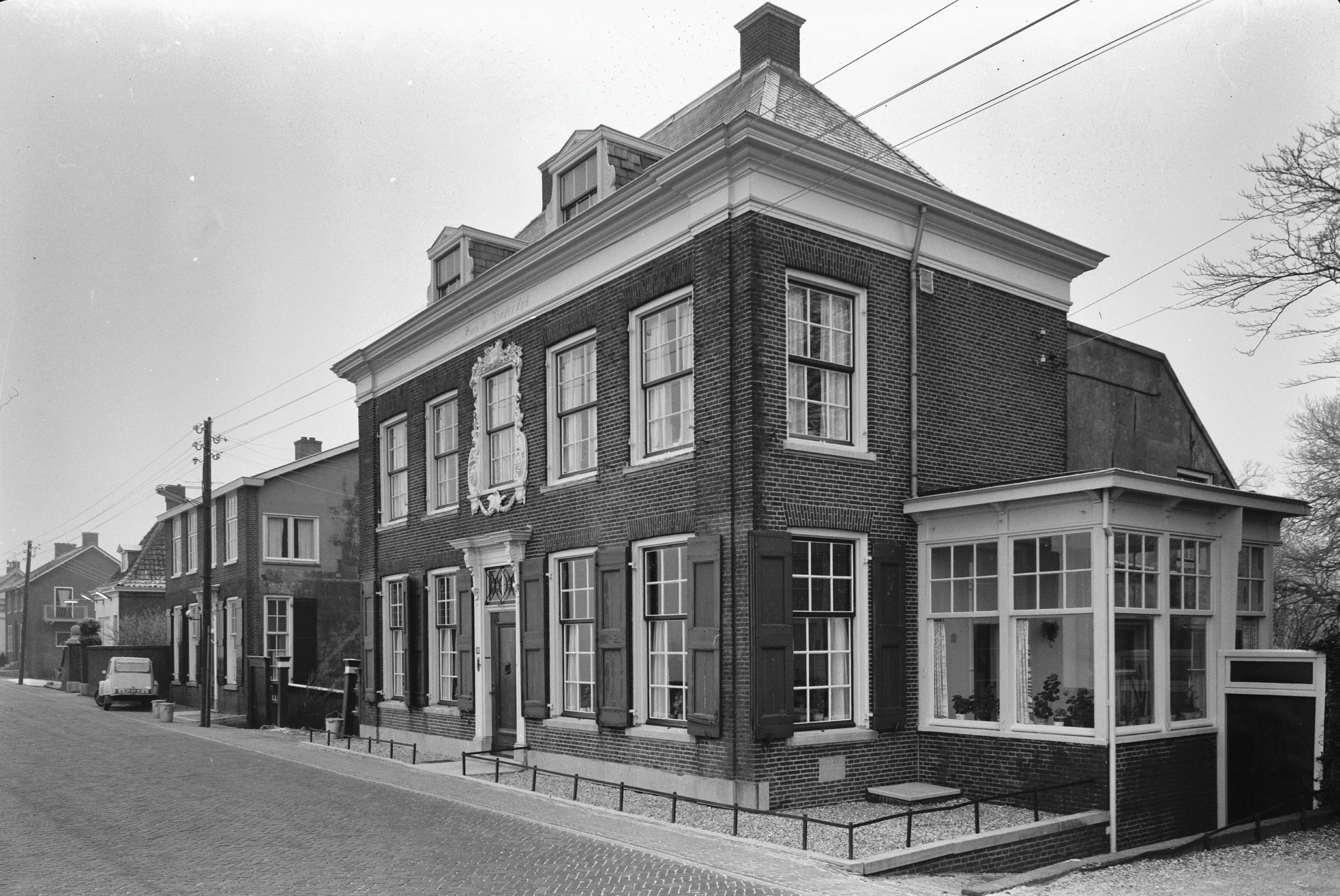 aanzicht